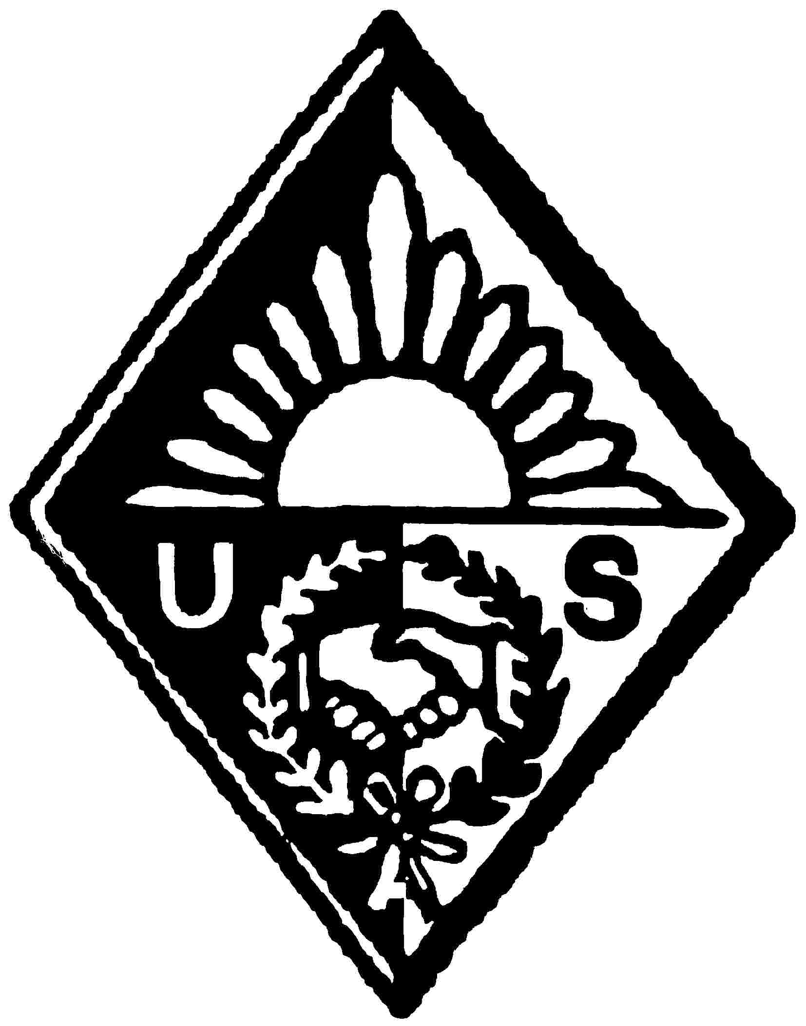 Het wapen der U.S.A.